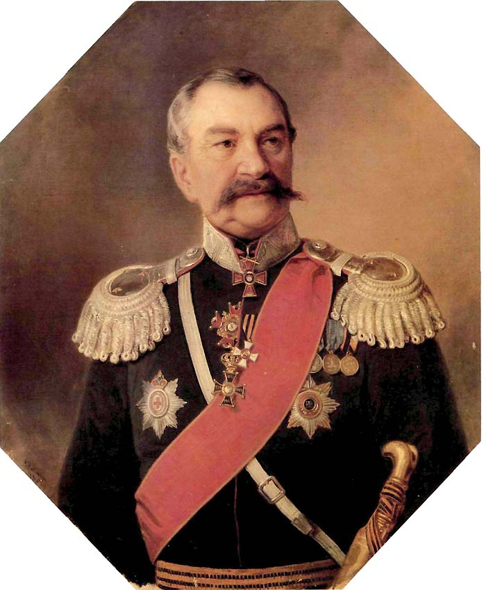 Иван Алексеевич Орлов (1795—1874)